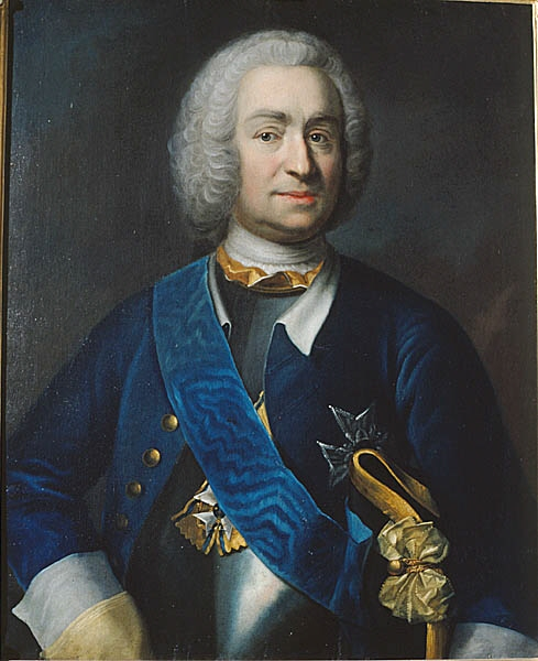 Mattias Alexander von Ungern-Sternberg, Född 1689, Död 1760. Avmålad av: Johan Henrik Scheffel, svensk, Född 1690, Död 1781. Tillskriven. Nationalmuseums inventarienummer: NMGrh 1526